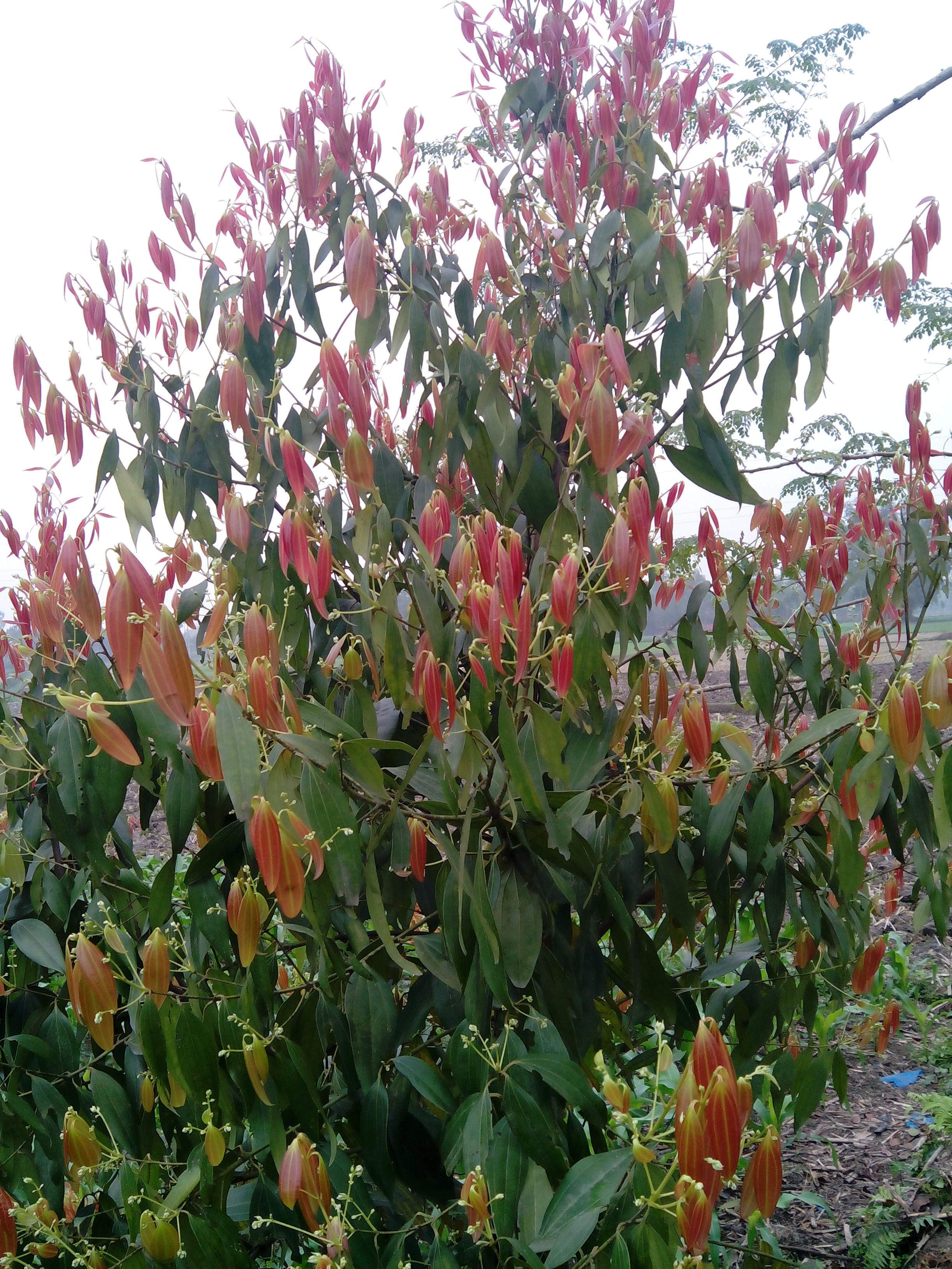 তেজপাতা